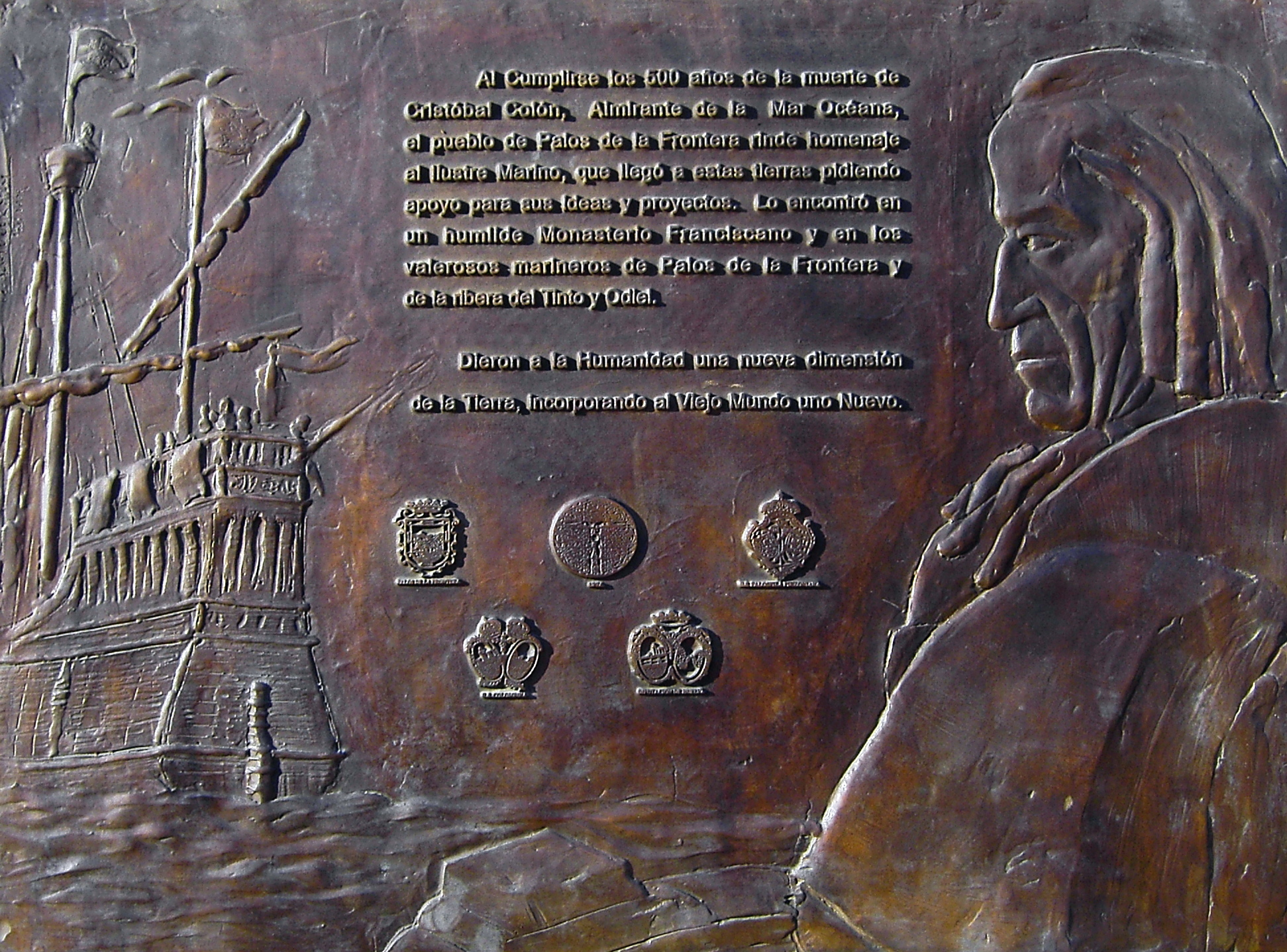 Placa conmemorativa por el V Centenario del fallecimiento de Colón. La Rábida.